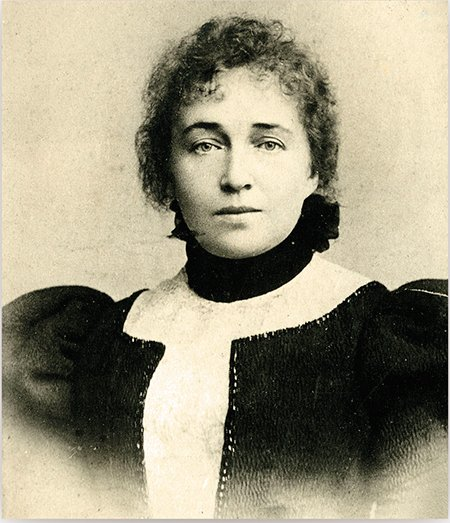 Anna Ivànovna Popova (1860-1942), 2a dona del químic rus Dmitri I. Mendeléiev